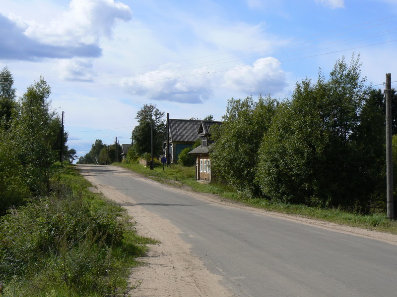 Бабино